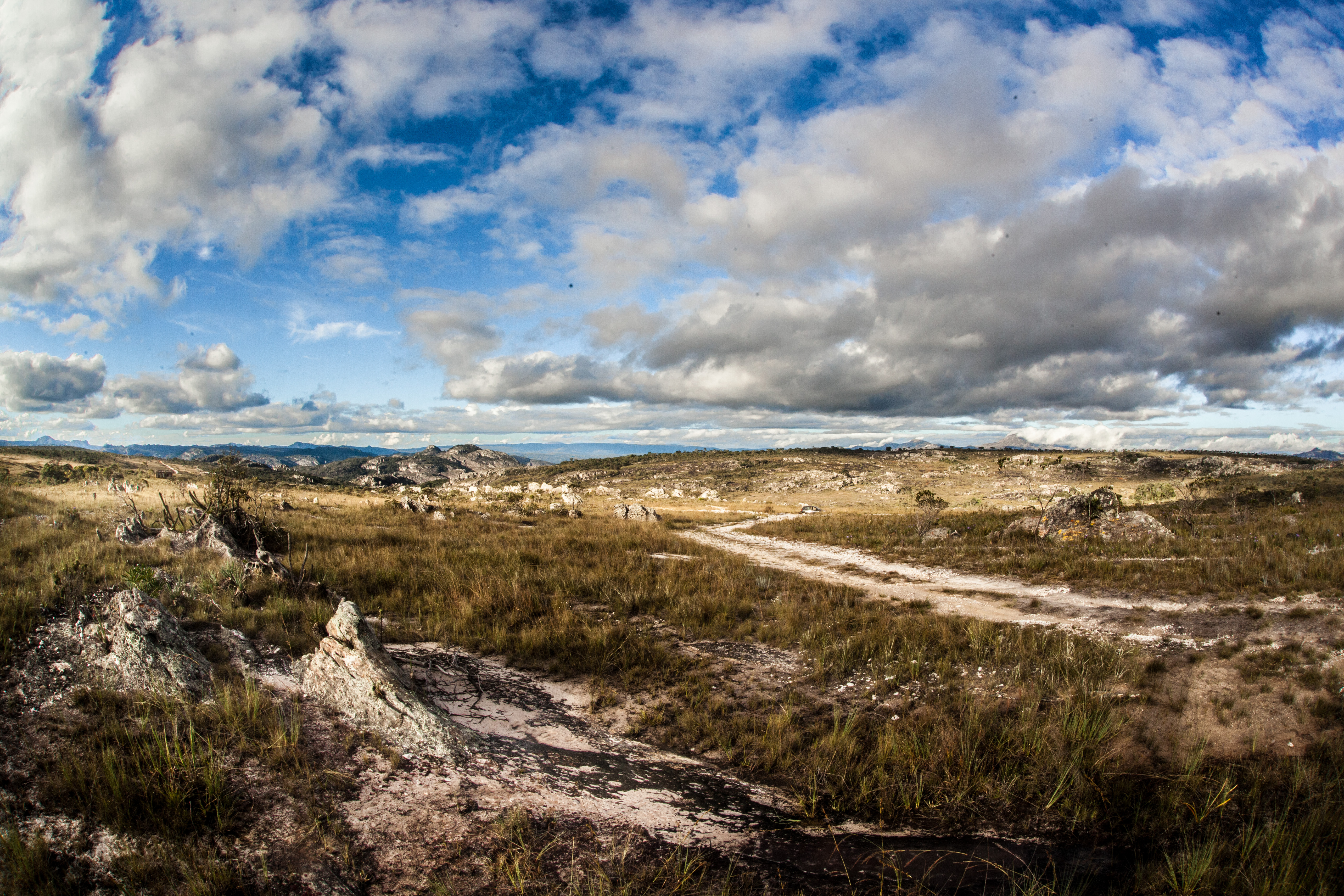 Estrada de acesso por dentro do Parque do Itambé